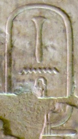 Kartusche des Wadjnes in der Königsliste des Totentempels Sethos I. in Abydos, Ägypten